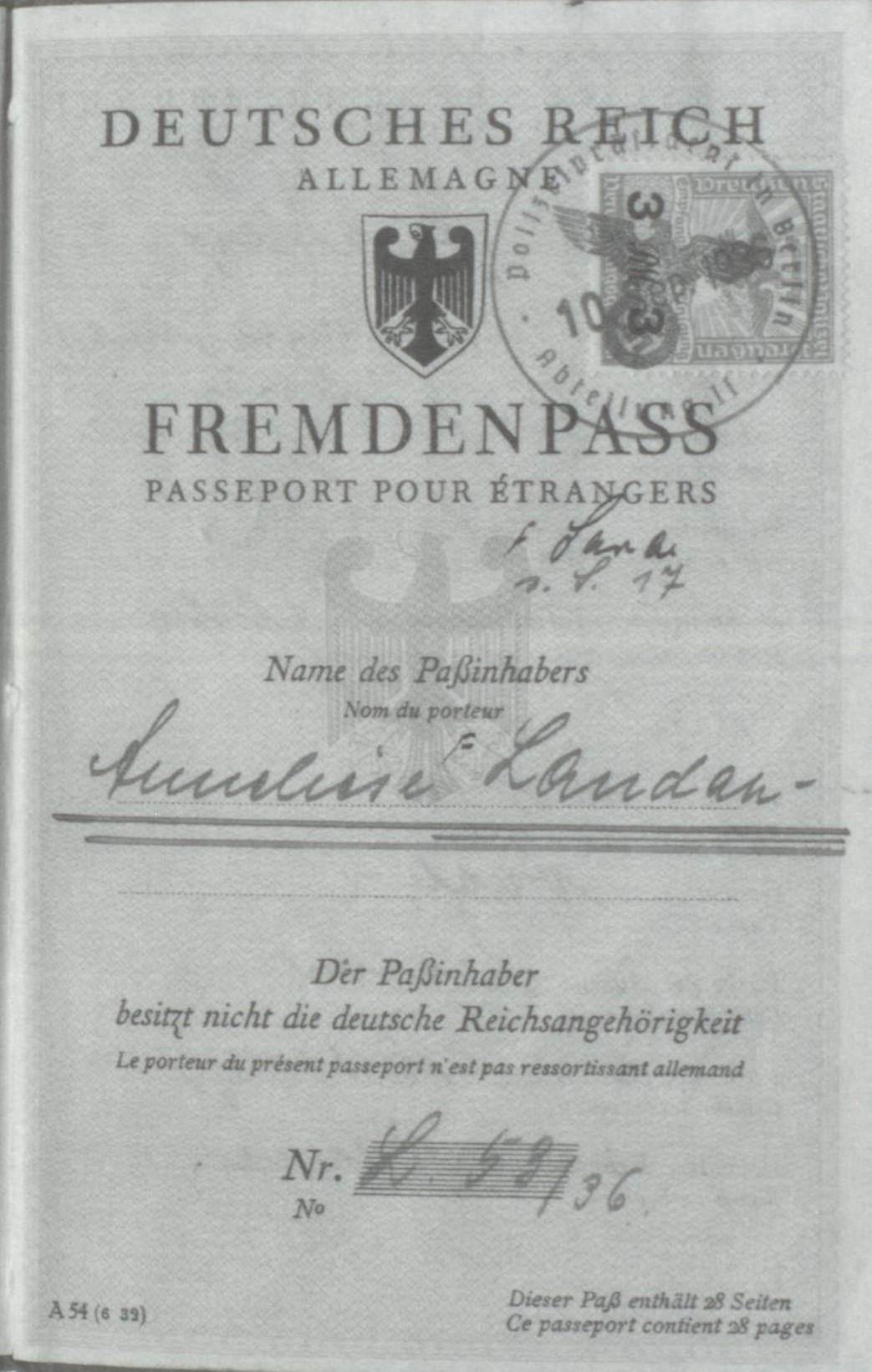 Fremdenpass von Anneliese Landau, 1936, zusätzlich zum Vornamen musste sie den Namen Sara tragen, dieser wurde hier nachträglich eingetragen